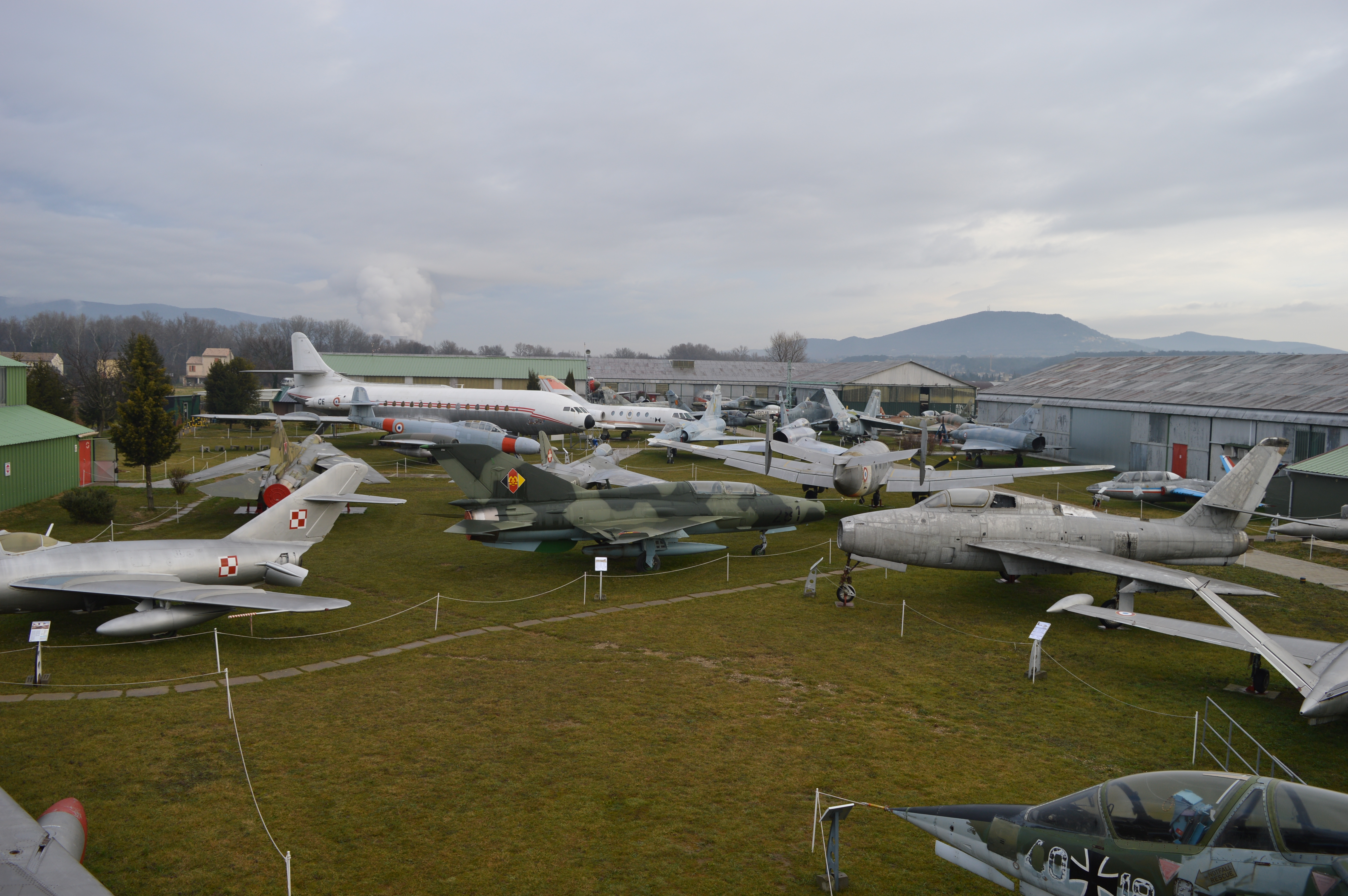 Parc avion MEAC